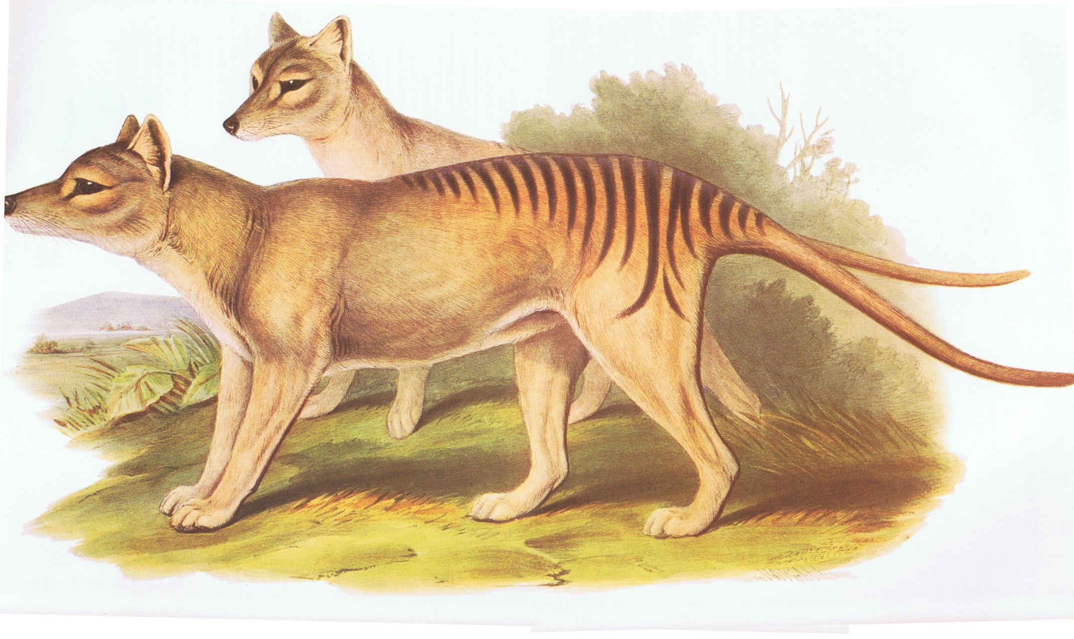 Thylacinus cynocephalus